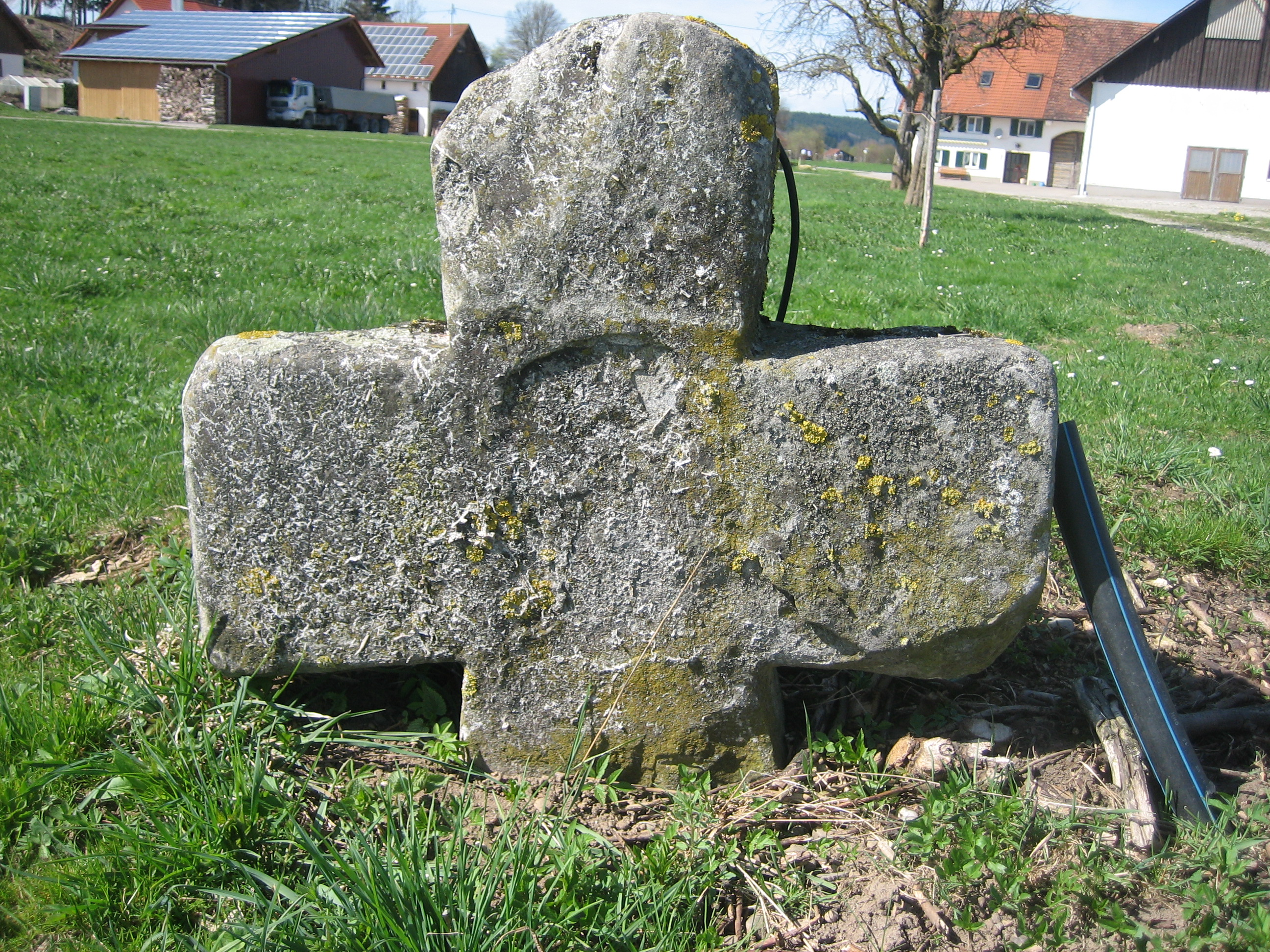 Steinkreiz in Raupolz, Bad Grönenbach, Landkreis Unterallgäu, Bayern